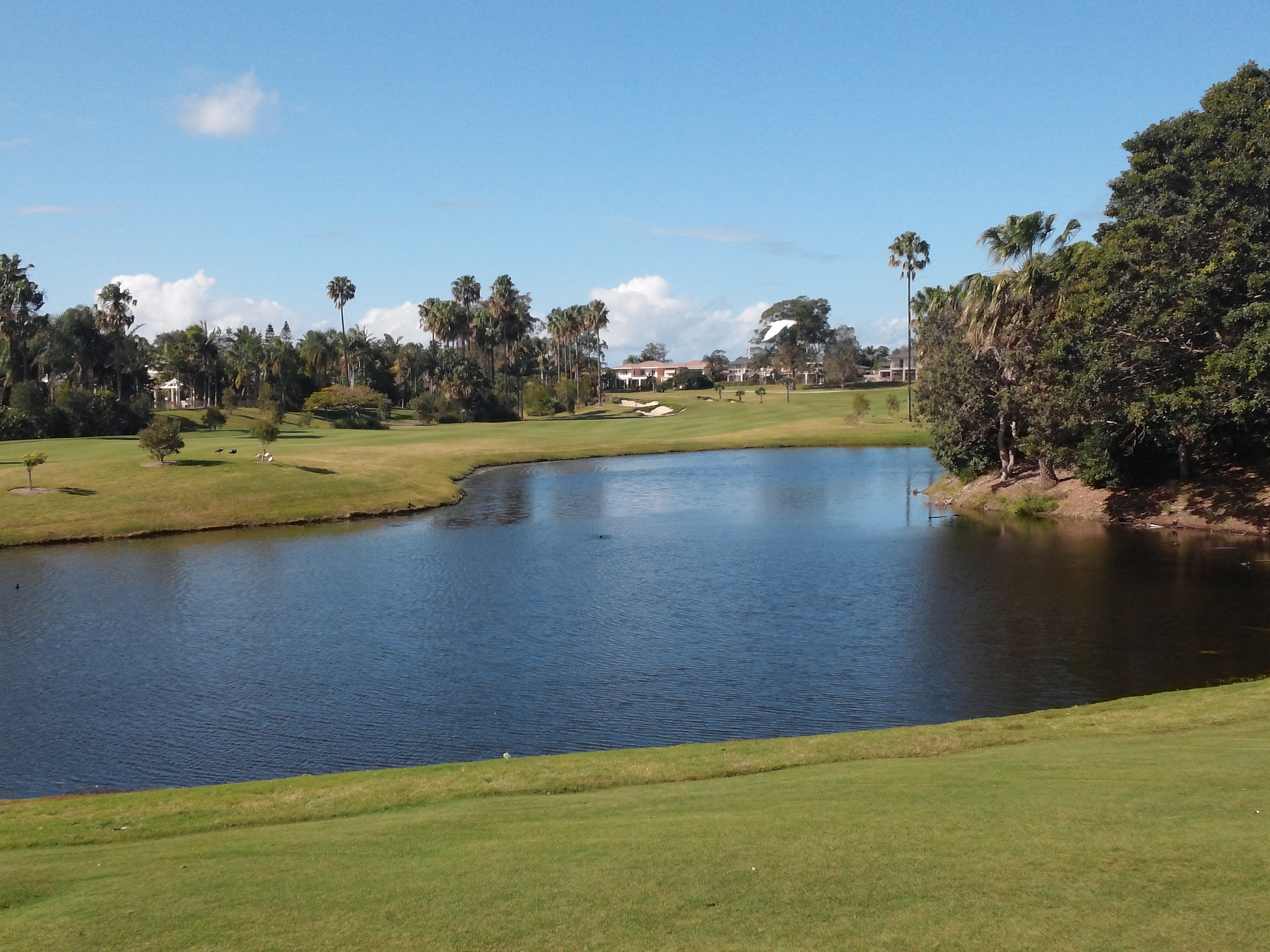 AnK Golf는 2006년도에 설립 되었으며, 현재 호주 Gold coast 에 위치하고 있으며, 호주정부에 승인 받은 공식 아카데미로서, 호주에서 가장 뛰어난 선수들을 배출하고 있는 골프 아카데미입니다.